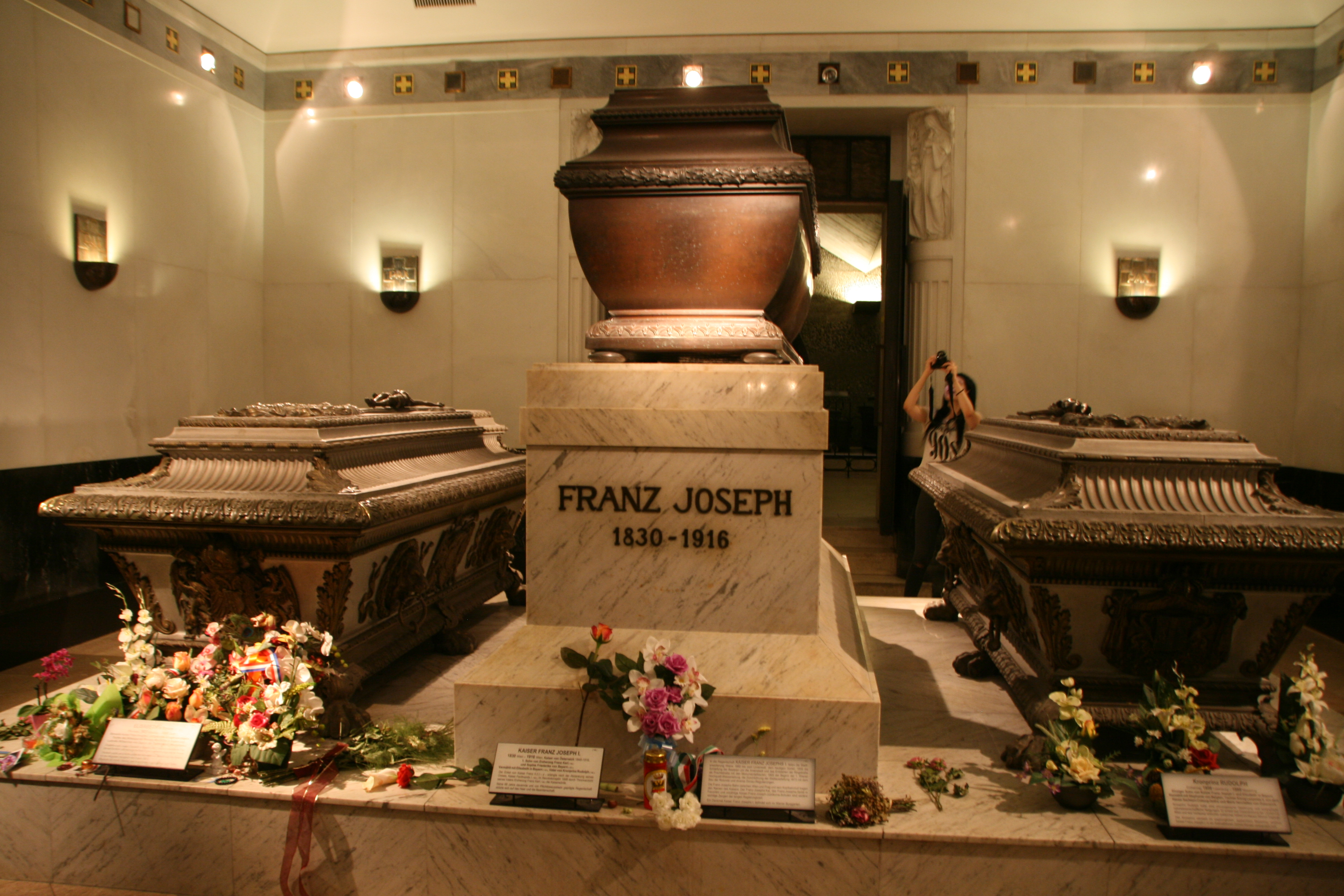 Kapuzinergruft Wien Dieses Bild wurde anlässlich des österreichischen Tags des Denkmals 2016 in Wien eingereicht.